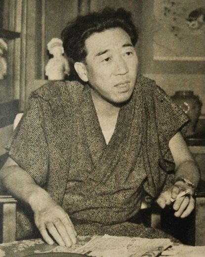 中江良夫